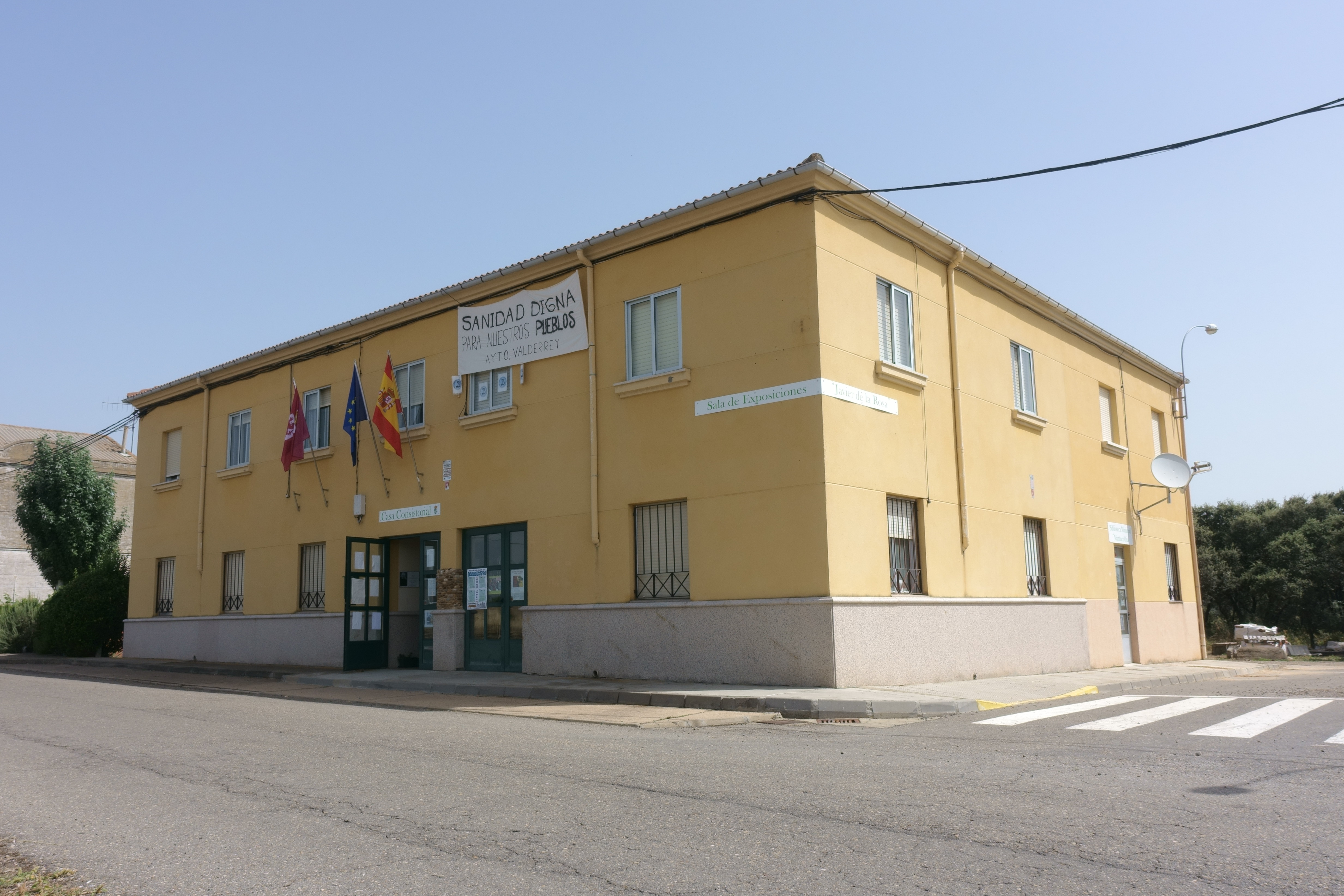 Casa consistorial de Valderrey (León, España).